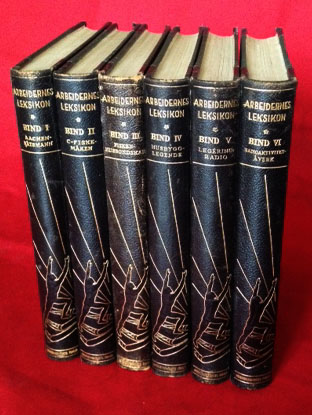 Arbeidernes leksikon